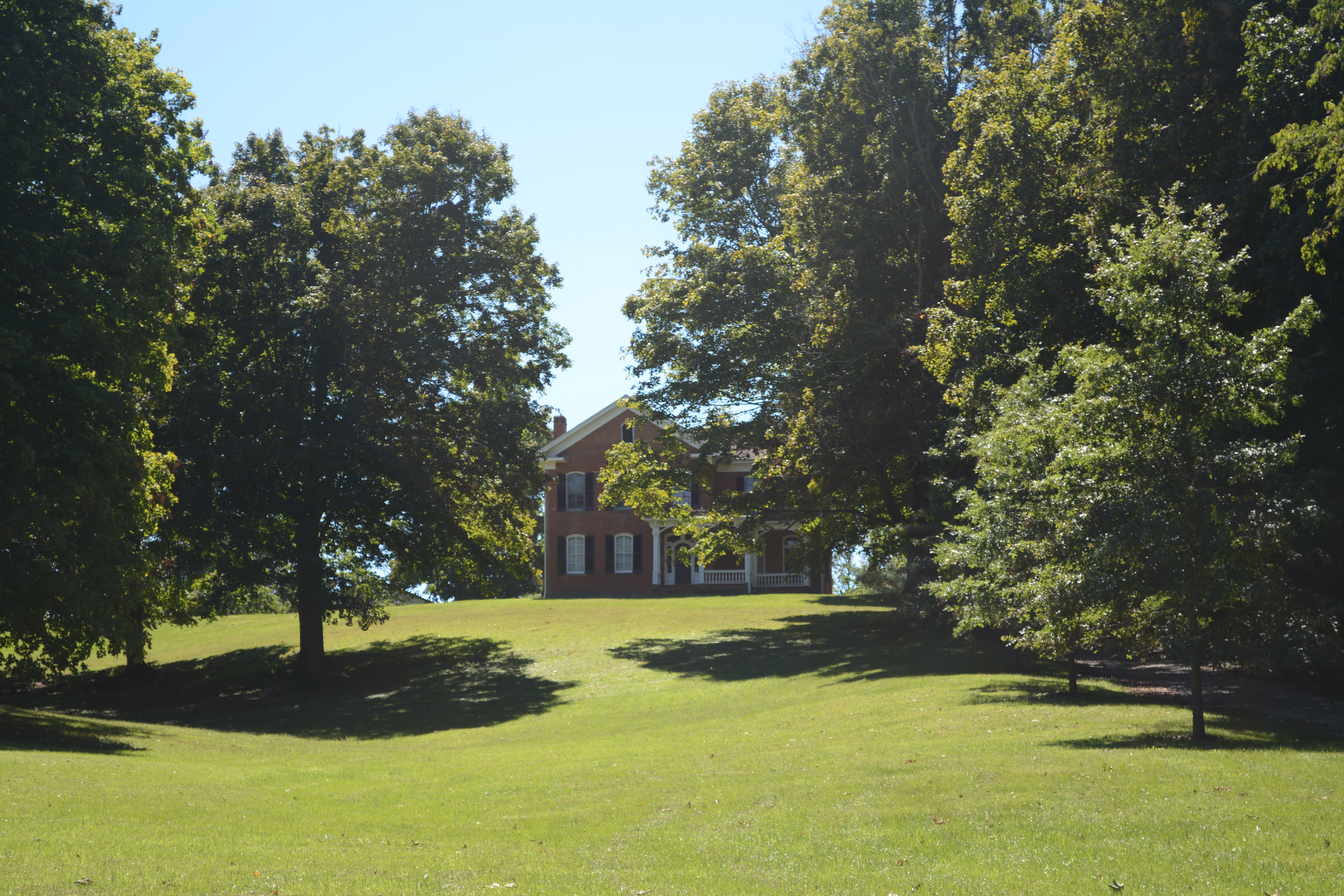 John Artz Farmhouse